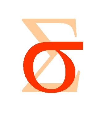 Greek letter